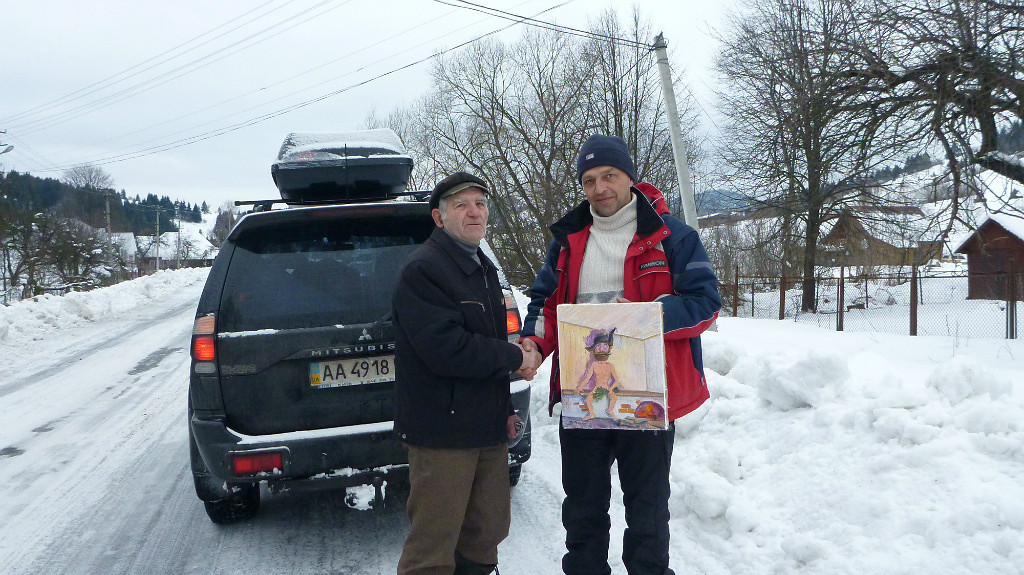 Друзі